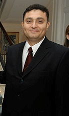 Isaac Alfie